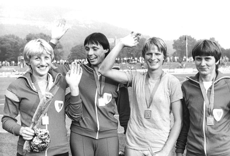 Ines Gaipel, Bärbel Wöckel, Ingrid Auerswald, Marlies Göhr ADN-ZB Thieme 9-8-81 Bez. Gera-32. DDR-Meisterschaft der Leichtathletik: Das Frauenquartett mit Ines Gaipel, Bärbel Wöckel, Ingrid Auerswald und Marlies Göhr (vlnr) vom SC Motor Jena siegte im 4x-100-Meter-Staffel-Lauf der Frauen in 42,35 Sekunden.